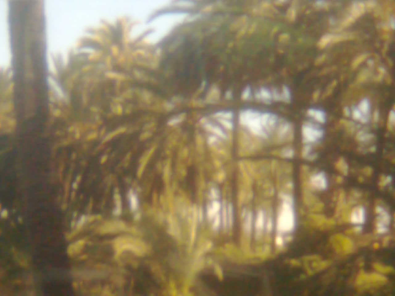 zona frondosa del palmeral de Orihuela